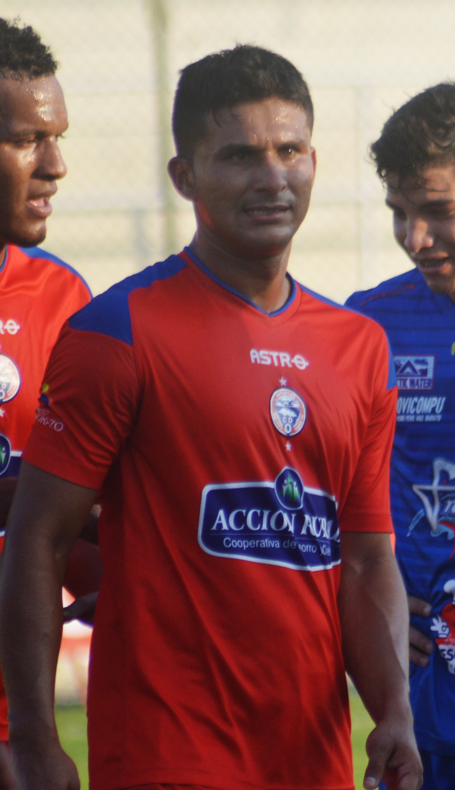 Víctor Macías con la camiseta del Olmedo en el 2015